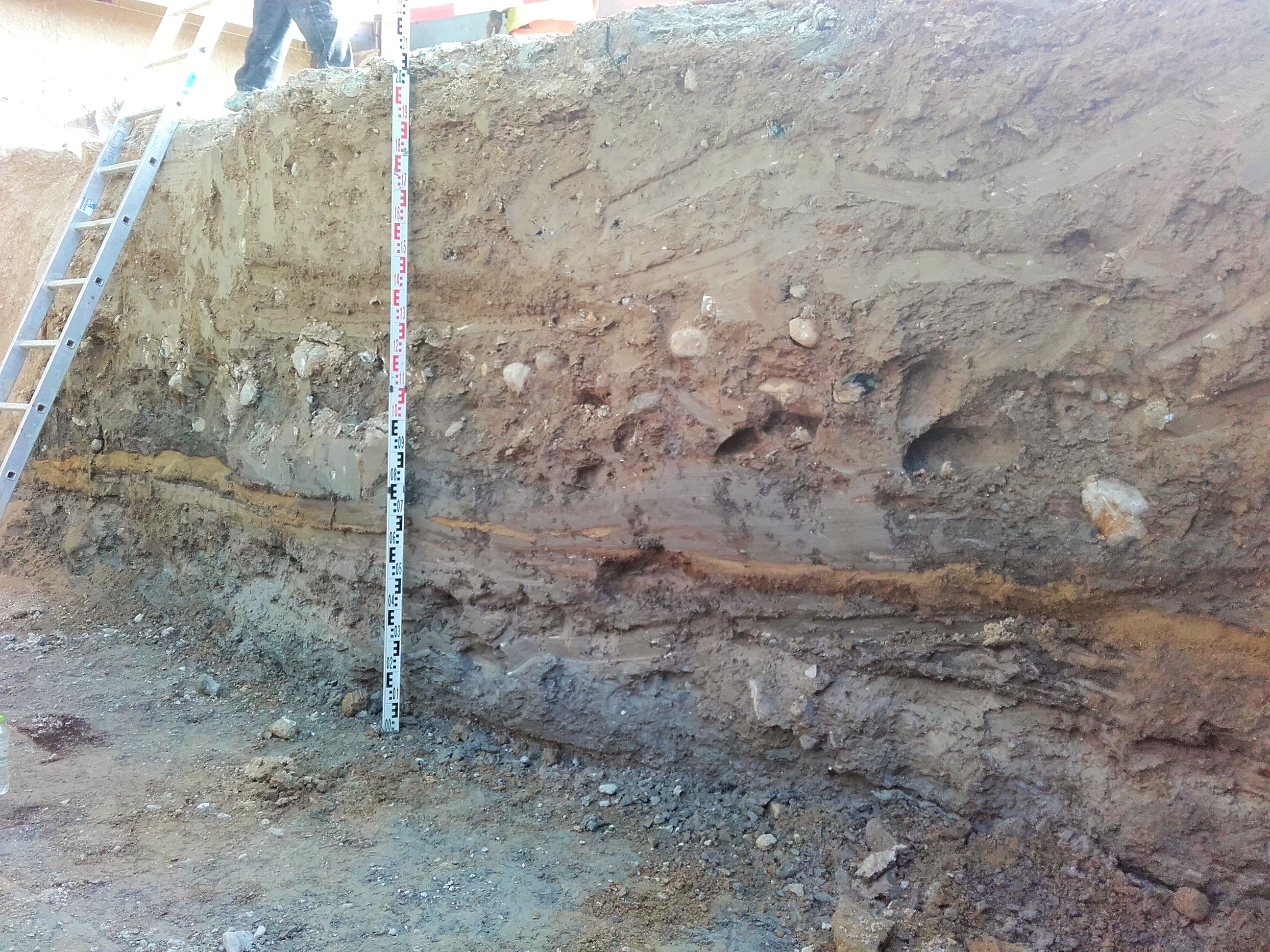 Moræneler med brolægning af sten øverst og okkerholdige sandstriber forneden (Kastrup lufthavn)